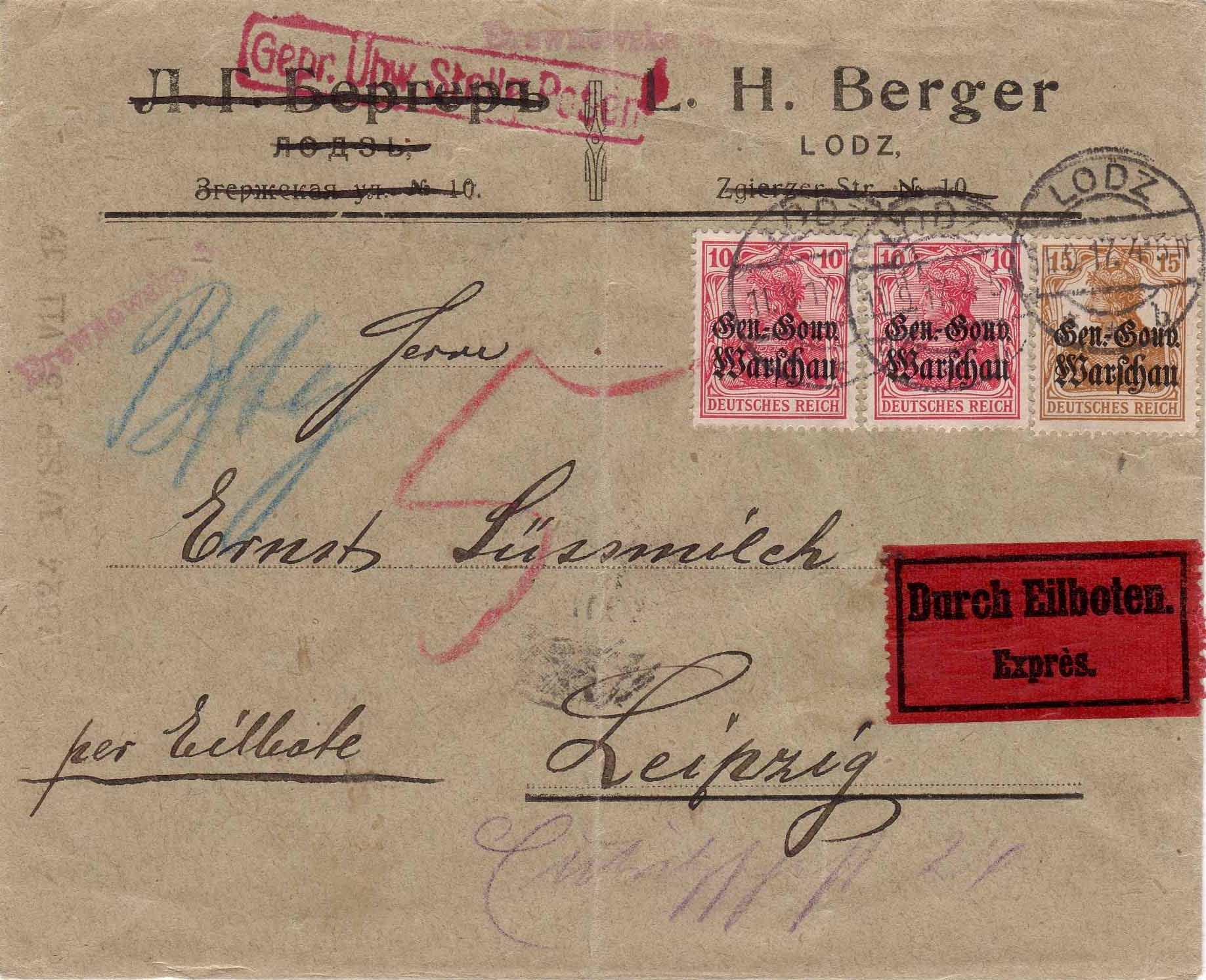 Eil-Brief aus dem Generalgouvernement aus dem Jahre 1917 nach Leipzig, dort per Rohrpost befördert